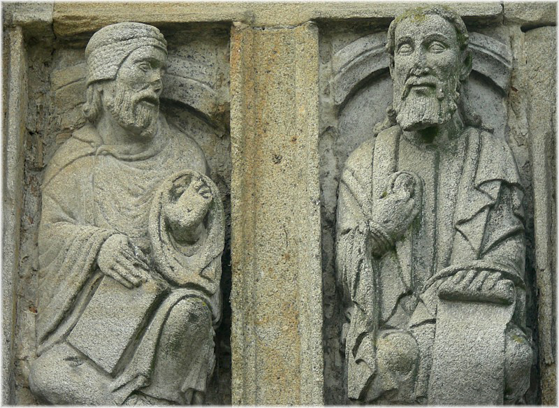 Porta Santa, de la Catedral de Santiago de Compostela. A la izquierda, el profeta Jeremías; a la derecha, el apostol Santiago el Mayor.